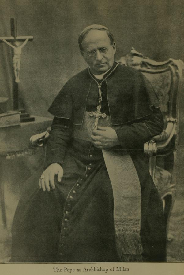 پاپ پیوس یازدهم.